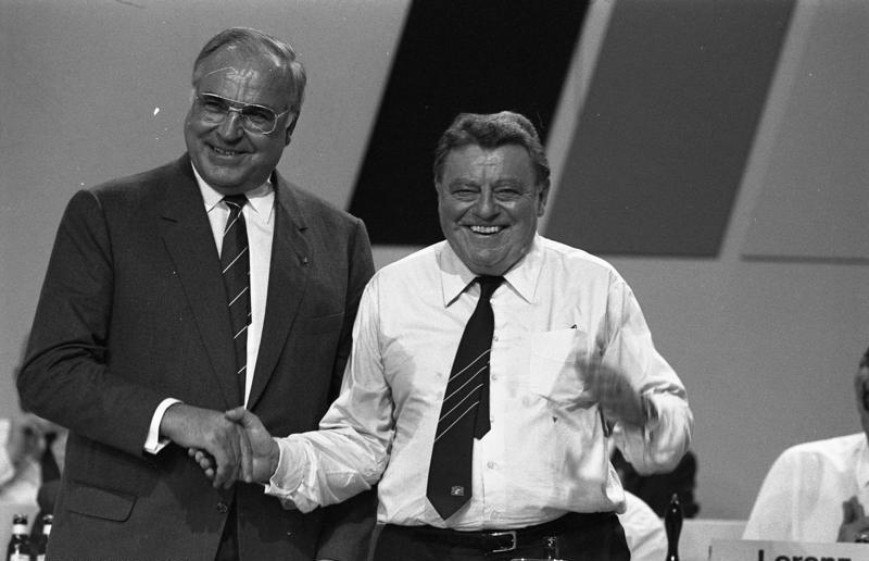 7./8.10.1986 34. Bundesparteitag der CDU in der Rheingoldhalle, Mainz (6.-8.10.1986)